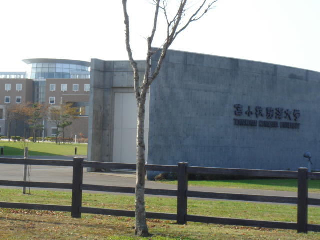 苫小牧駒澤大学